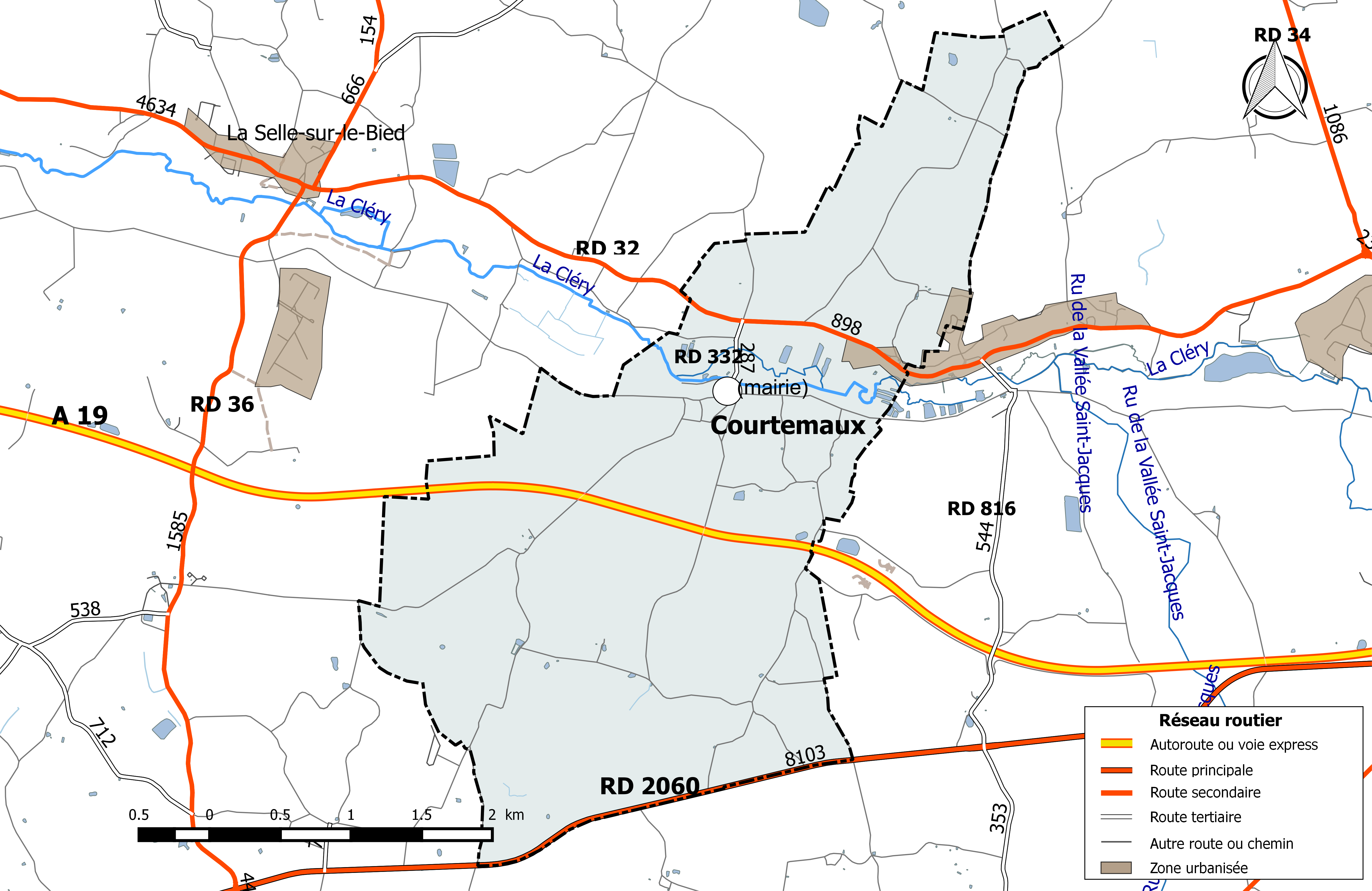 Carte du réseau routier de la commune de Courtemaux.